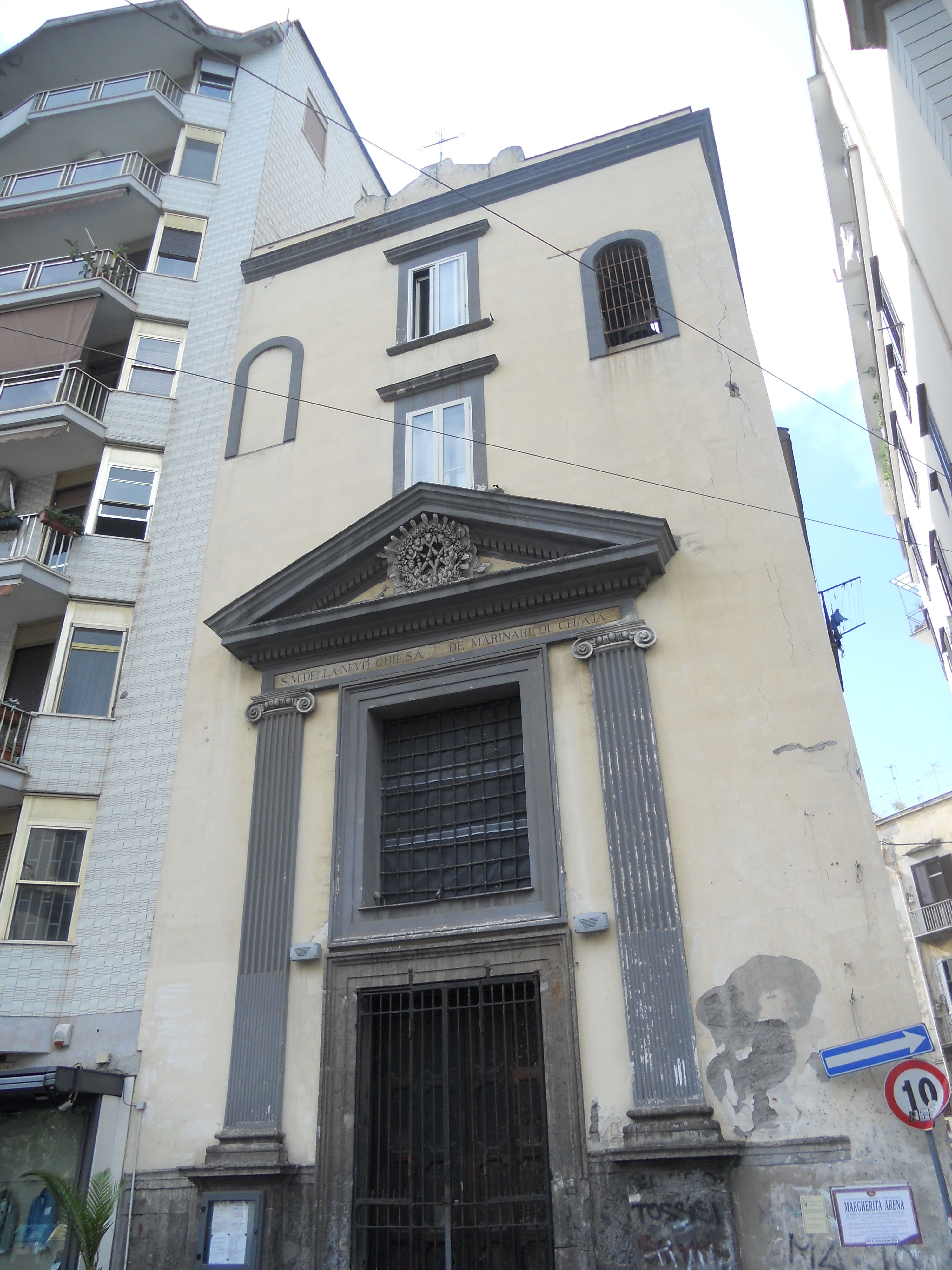 Facciata, Chiesa di Santa Maria della Neve in San Giuseppe (Napoli)